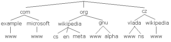 Ukázkový strom doménových jmen. Na obrázku je velice drobná část stromu Internetových domén.)